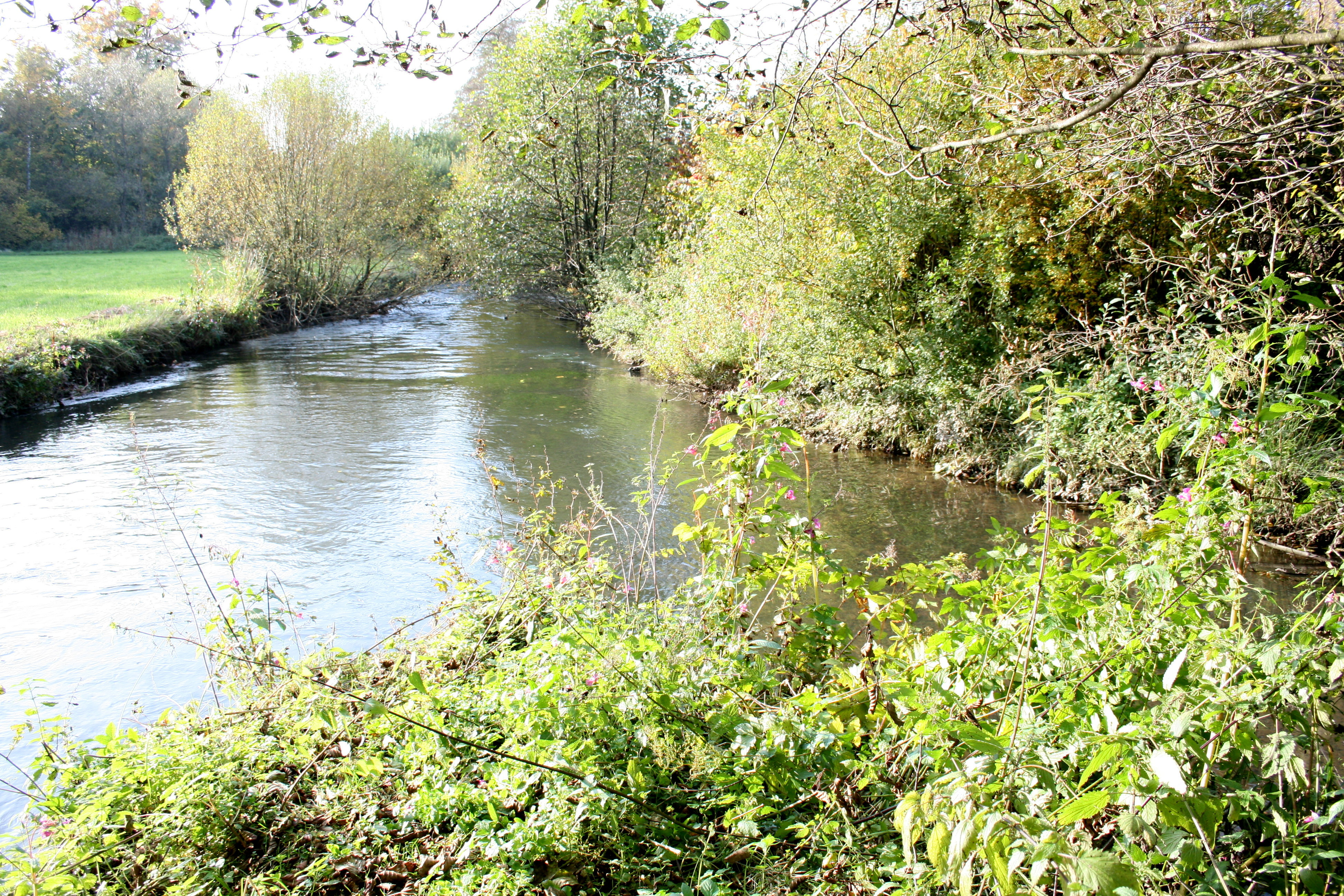 Durch den Zufluss der Kerspe (rechts) wird die Wipper (vorn) zur Wupper (hinten)